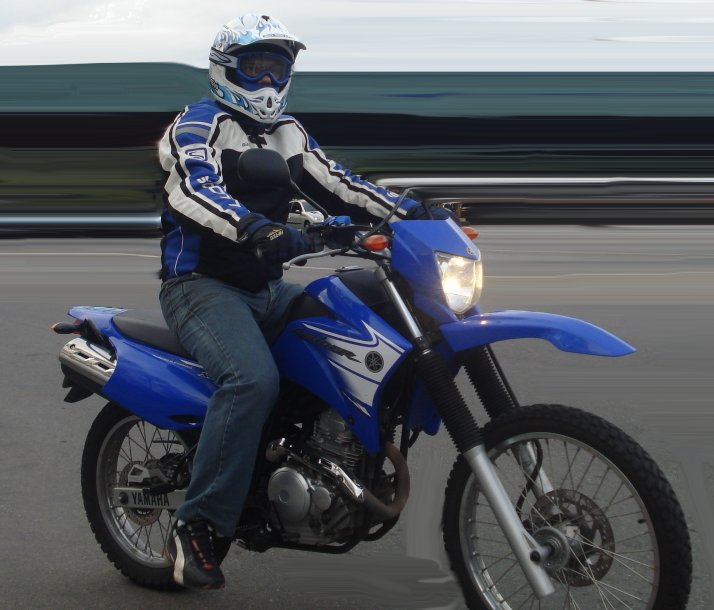 Foto tirada na via lagos - Cabo-frio - Niterói - Moto Lander 250 On- OFF road ,XTZ ,motocross